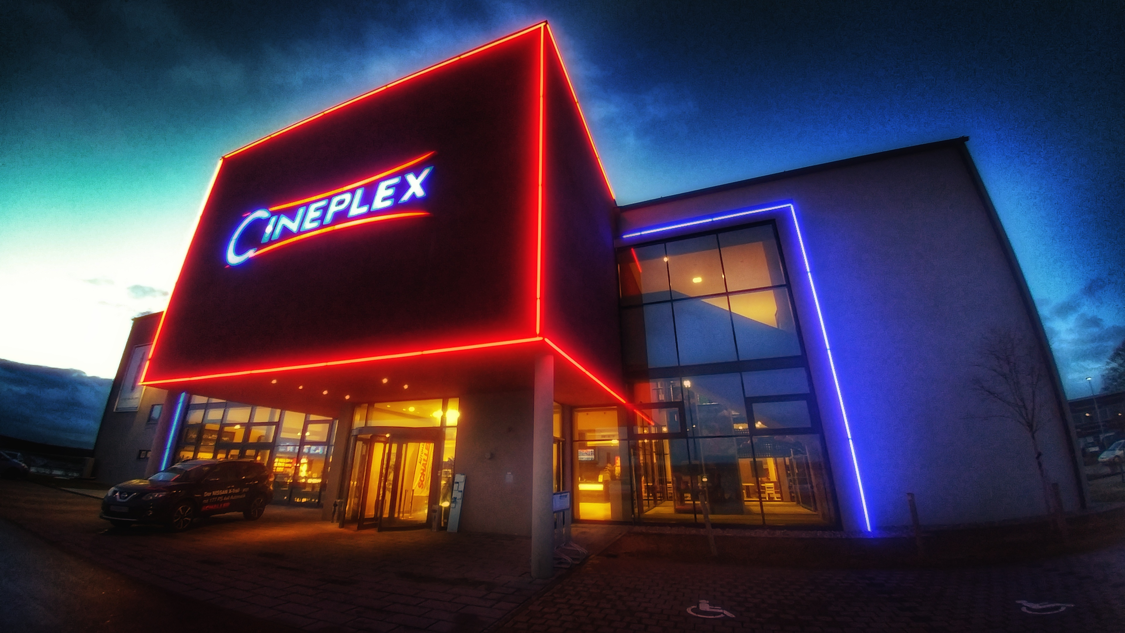 Aussenansicht